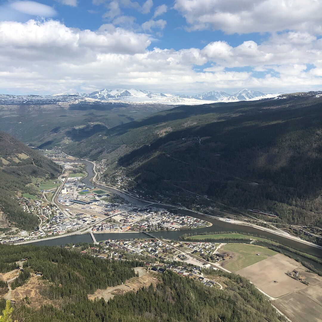 Byen otta sett fra Pillarguritoppen. I bakgrunn ses Rondane.